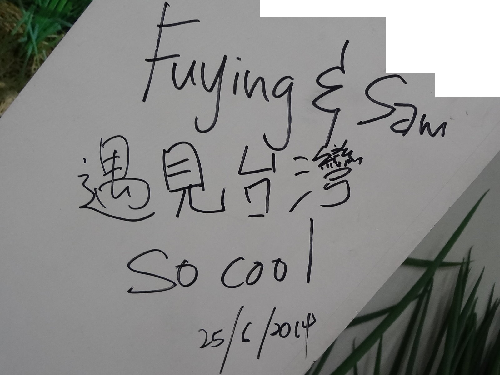 2014年6月25日，Fuying & Sam網路節目《遇見台灣 So Cool》在宜蘭縣三星鄉天福村的簽名。